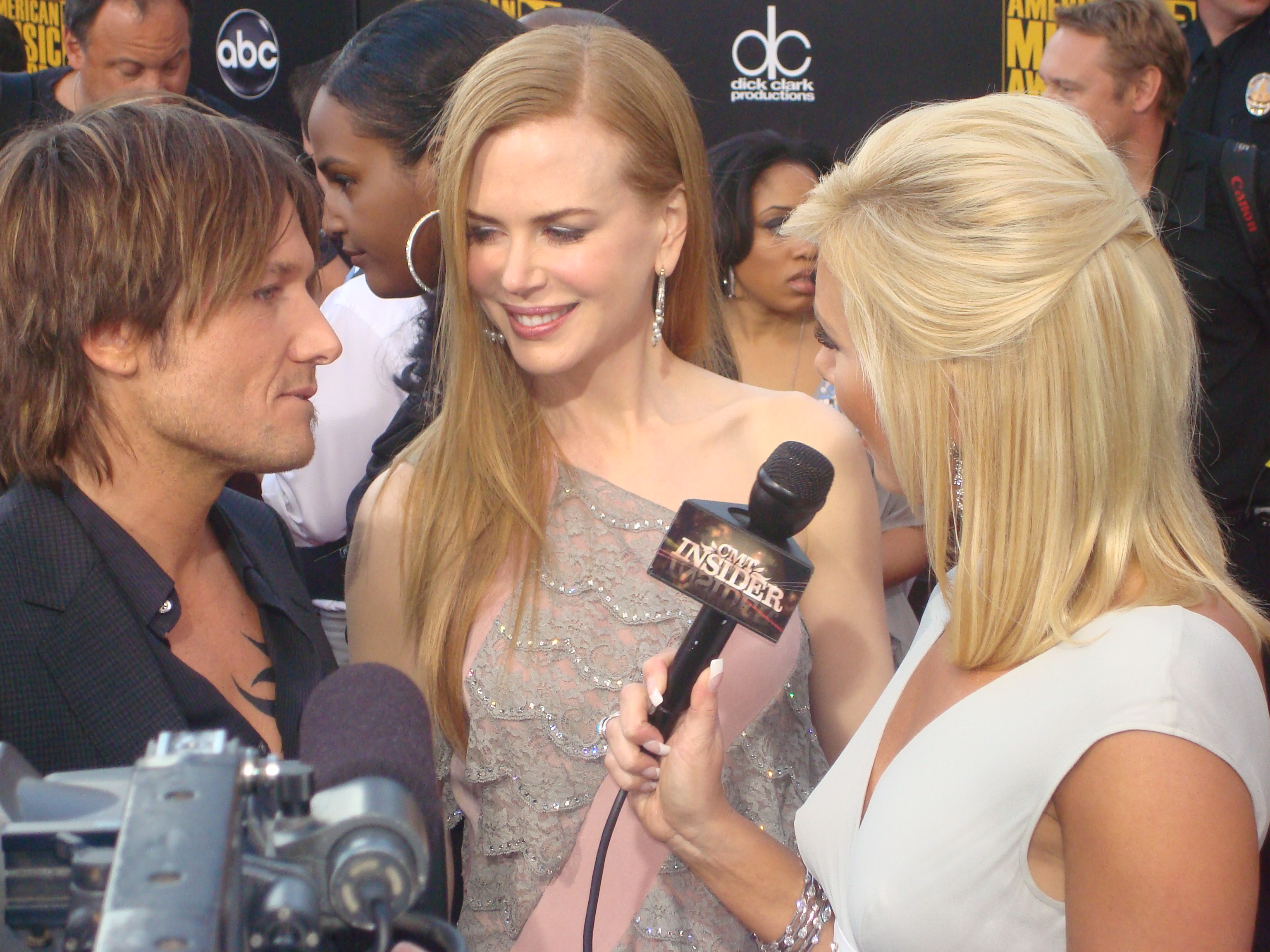 Nicole Kidman no American Music Award (2009)